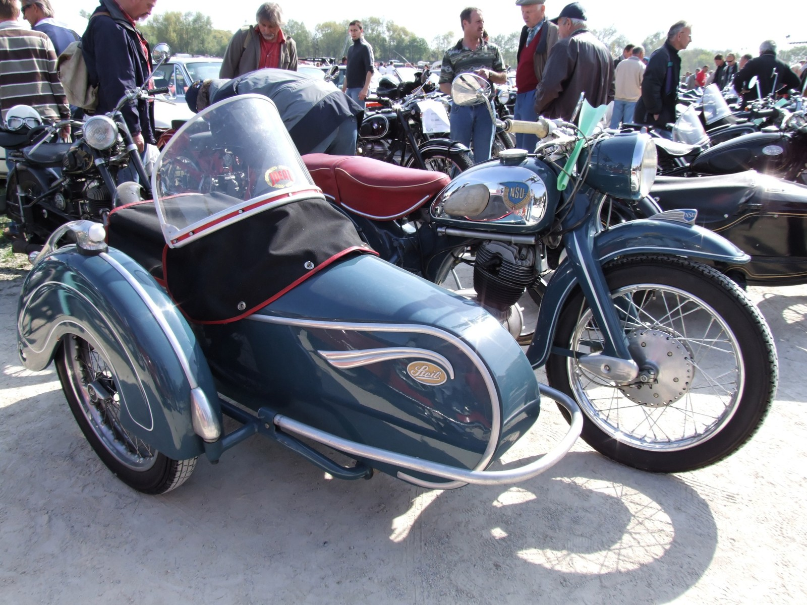 Quelle: selbst fotografiert, 04/2007 Fotograf: Späth Chr.